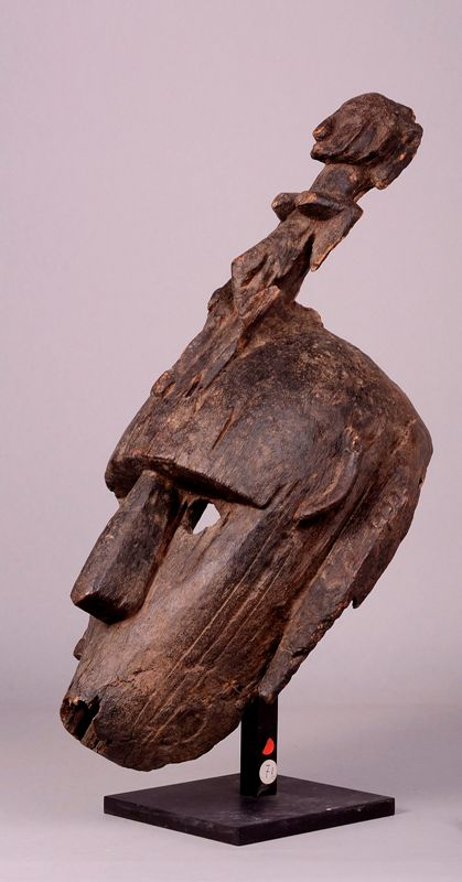 Maschera Dyoboli - Sulla testa è seduta una figura femminile; la fronte bombata termina con la linea diritta dell'arcata sopraccigliare sotto la quale stanno gli occhi, rotondi e forati. Il piano del volto di forma triangolare e mento appuntito (deteriorato) è tagliato verticalmente dal setto nasale. Ai lati scendono due trecce spiraliformi che partono da dietro le orecchie sporgenti. Queste maschere sono diffuse non solo presso i Marka, ma anche fra i Bamana e i Bozo del Mali. Rappresentano una bella donna come si desume dalle fattezze del volto, dall'acconciatura e dall'abbigliamento (il costume del danzatore). Per quanto il significato resti sostanzialmente lo stesso, lo stile può cambiare in modo anche molto deciso da un gruppo all'altro. Queste maschere compaiono spesso a coppie o a gruppi di tre o quattro. Unitamente alla celebrazione della bellezza femminile, queste maschere (indossate da uomini) denunciano anche i difetti delle donne (quelli che appaiono tali da un punto di vista maschile). Questi difetti, come ha evidenziato James Imperato (1994), possono essere visualizzati nella maschera attraverso l'introduzione di corna di antilope, che in quanto elementi animali infrangono l'estetica del corpo umano con elementi di disturbo. Anche i cori che accompagnano la performance della maschera denunciano il comportamento delle donne che respingono neghittosamente i pretendenti in attesa del marito ideale, così disobbedendo ai genitori e finendo per ritrovarsi, una volta sfiorita la loro bellezza, vecchie e sole.